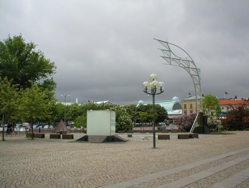 Foto av konstverket Tidsdokumentet i Göteborg, taget av Per Johansson 2005.